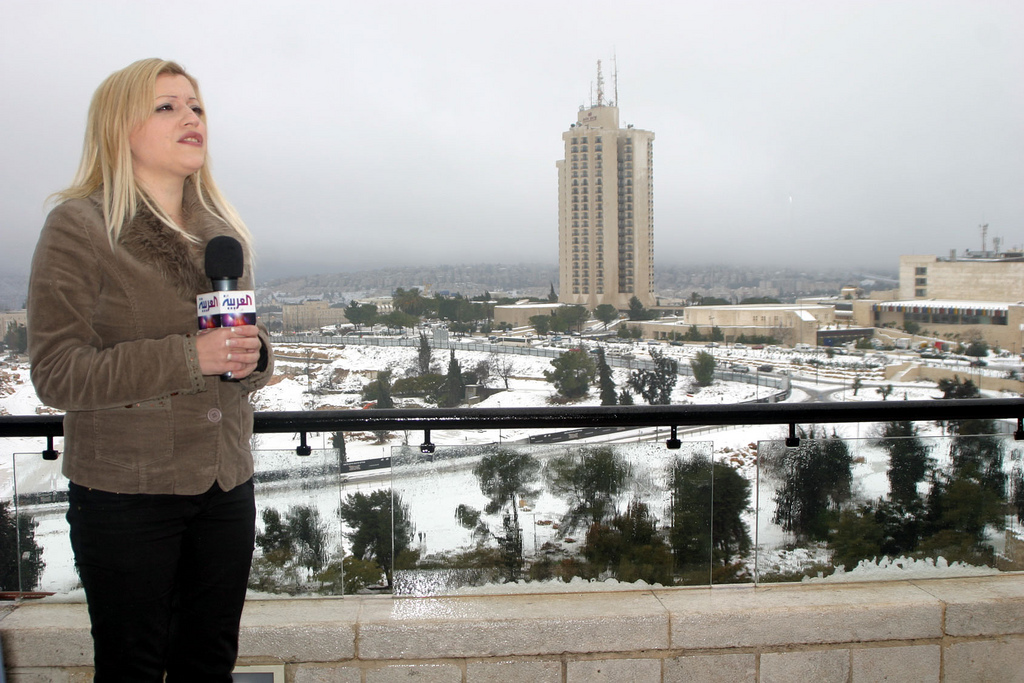 "al-Arabiya" Reporter Rima Mustafa in Jerusalem